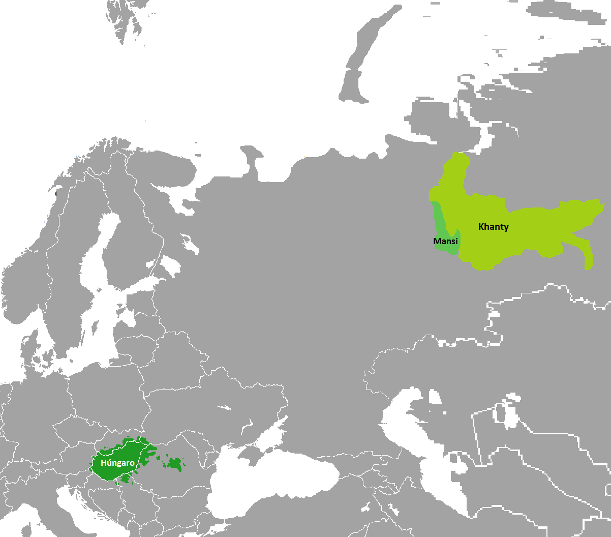 Lenguas ugrias